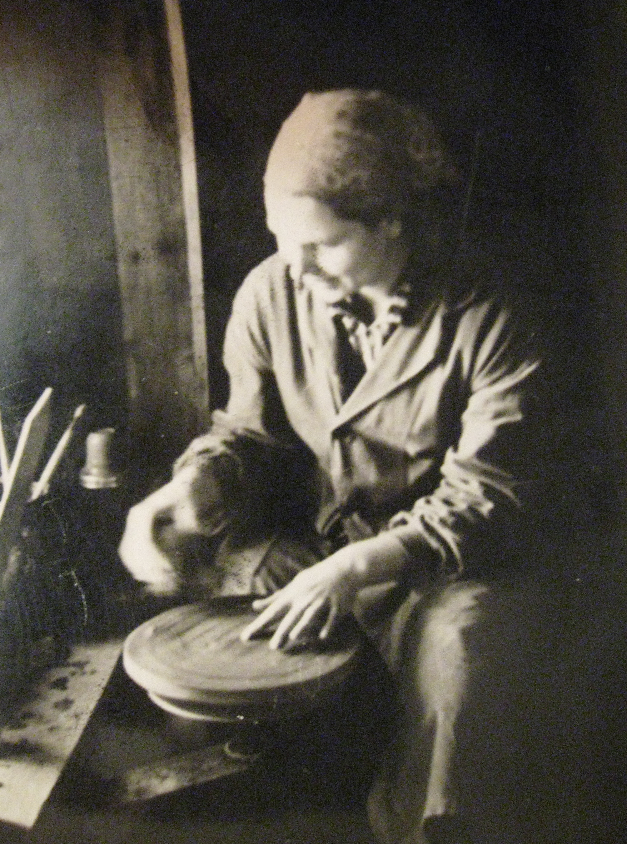 Keramiķe Marija Ozoliņa